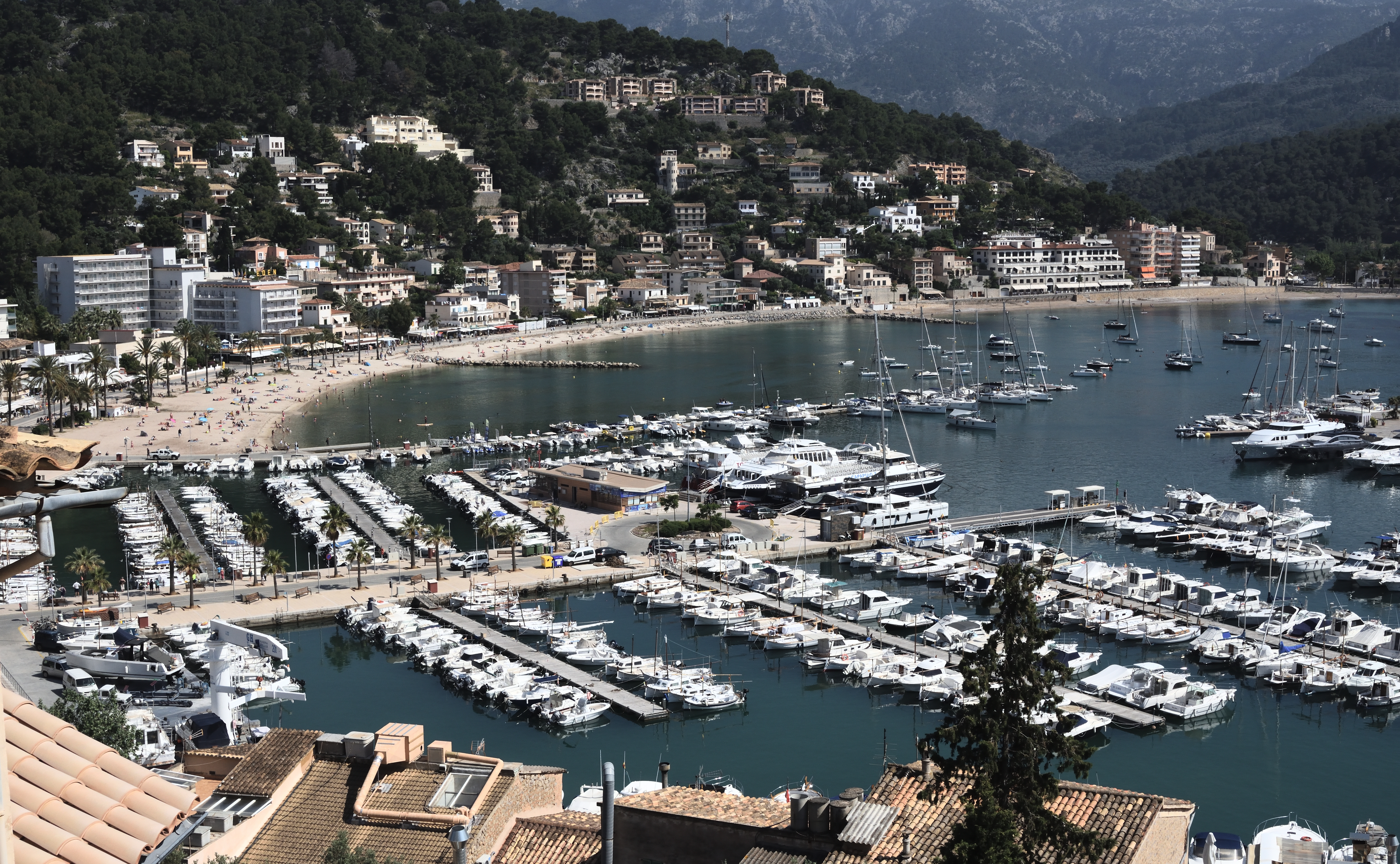 Puerto de Sóller